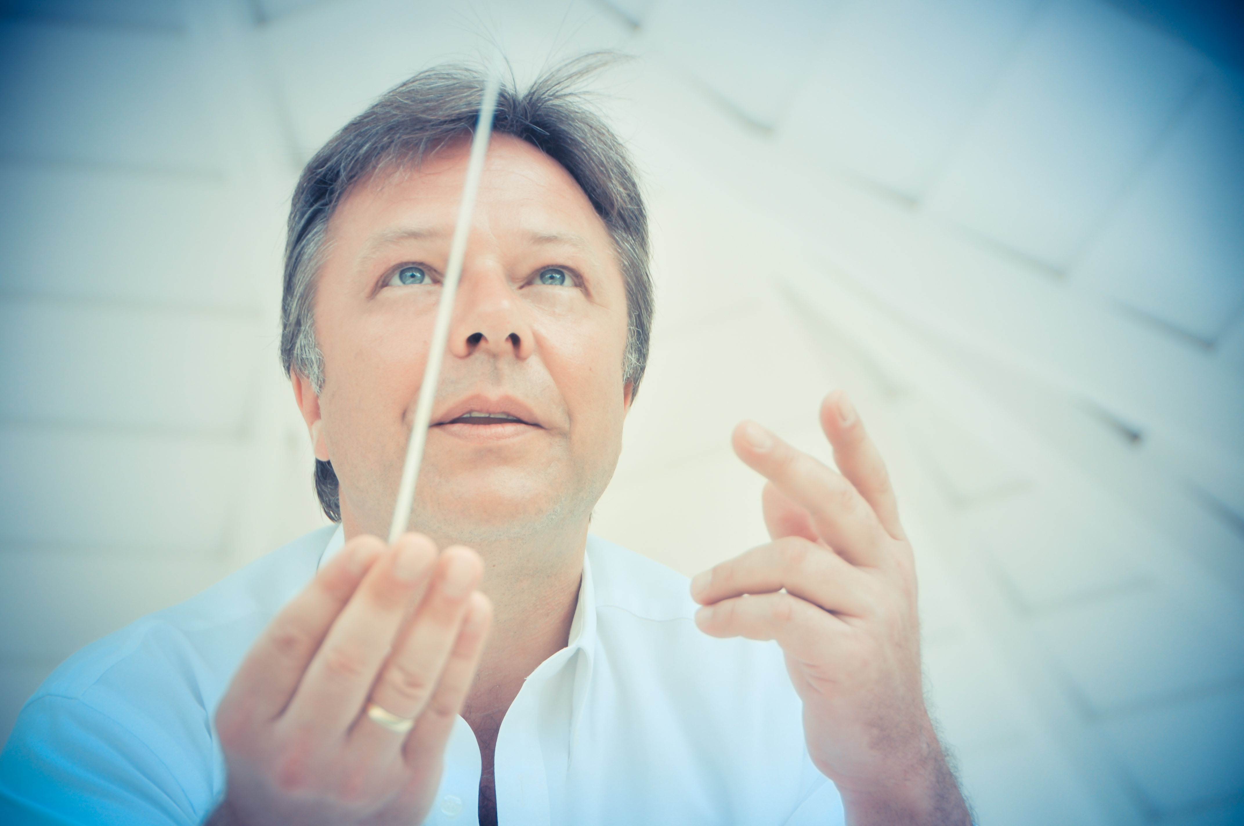 Dirigent, Pädagoge, musikalischer Botschafter über Grenzen hinweg: Thomas Clamor überträgt seine Begeisterung und sein Engagement gleichermaßen auf Musiker und Publikum. Der Chefdirigent der Sächsischen Bläserphilharmonie ist international gefragter Gastdirigent: Er konzertiert mit seinem Orchester, aber auch mit zahlreichen anderen sinfonischen Orchesterformationen und Kammermusik-Ensembles rund um den Globus. Viel beachtete Rundfunk-, CD- und DVD-Produktionen dokumentieren sein Schaff in seiner stilistischen Breite. Thomas Clamor gründete das European Brass Ensemble mit Sitz im Kloster Stift Melk (UNESCO-Weltkulturerbe) und hat mit dem ebenfalls von ihm gegründeten Venezuelan Brass Ensemble einen Platz auf den großen Bühnen der Welt gefunden. Er dirigierte u. a. bei den Salzburger Festspielen, den London Proms, in der Carnegie Hall, der Berliner Philharmonie und ist ein gern gesehener Gast vieler Orchester in China, Korea, Südamerika und in Europa.